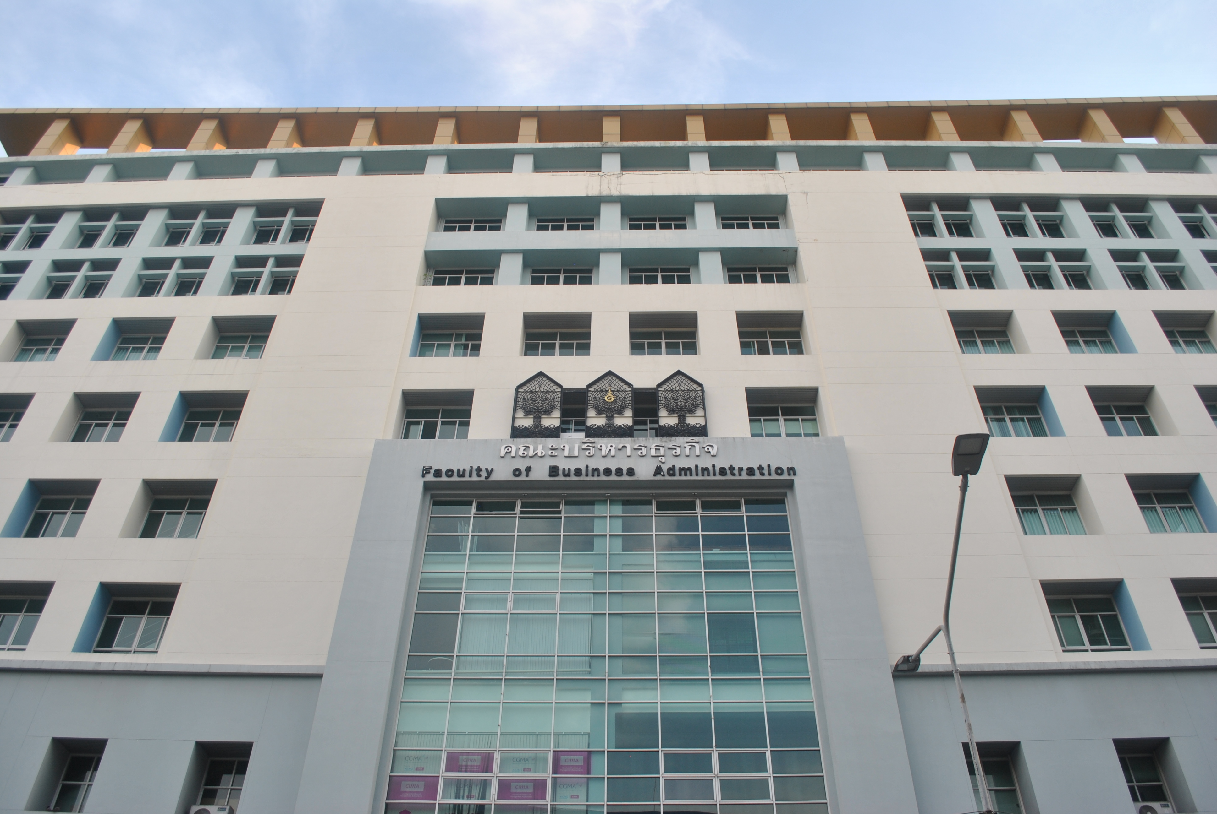 ตึกคณะบริหารธุรกิจ มหาวิทยาลัยเกษตรศาสตร์